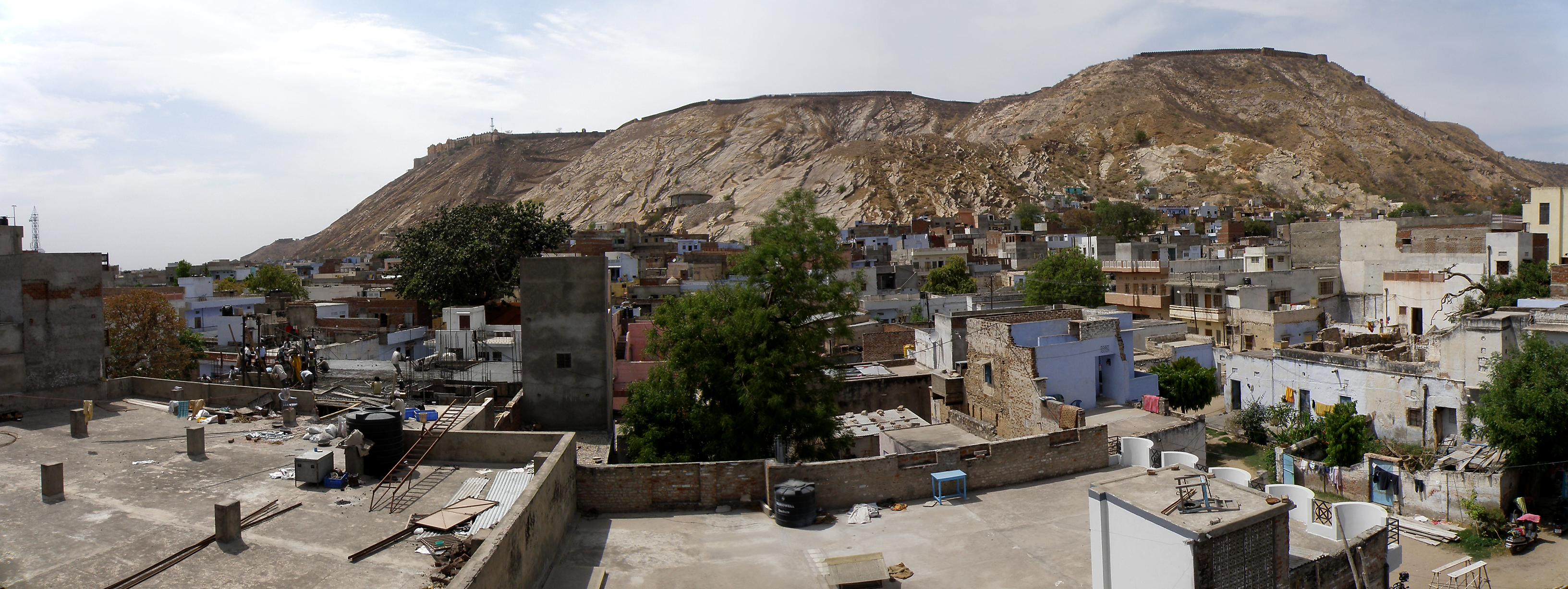 Le fort Nahargarh vu depuis les toits de Jaipur - Rajasthan (Inde).